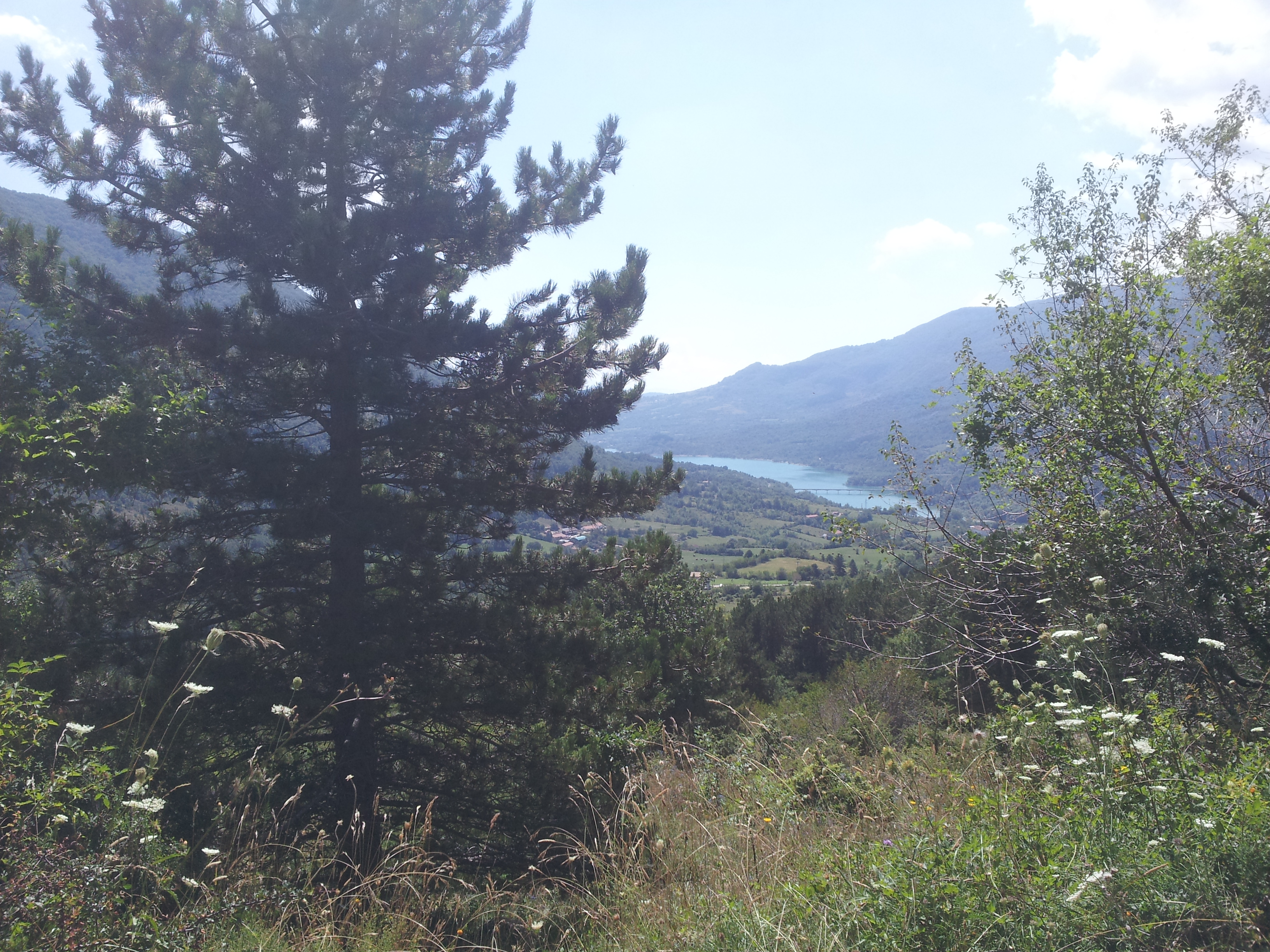 Lago di Barrea This is a photo of a monument which is part of cultural heritage of Italy.